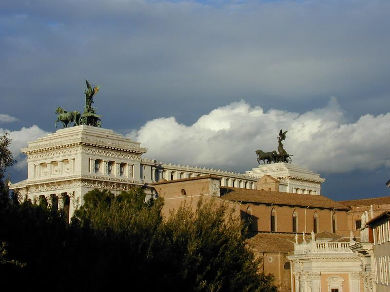 Roma, Vittoriano dal Campidoglio.